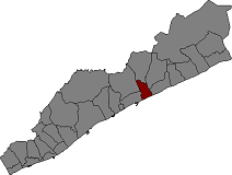 Localització de Canet de Mar al Maresme